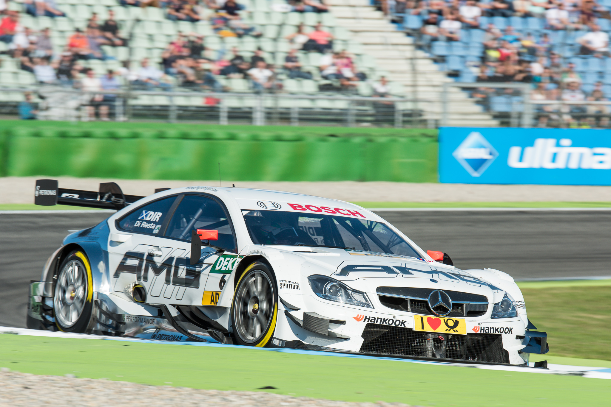 DTM,Deutsche Tourenwagen Masters,HWA AG,Hockenheimring,Mercedes AMG C-Coupe,Motorsport,Paul Di Resta